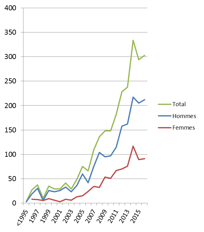 Graphique - Nombre annuel d'infections par le VIH dépistées et enregistrées en Arménie depuis 1995 Sources : (pour 2016)